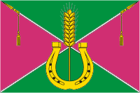 Флаг Кореновска, Краснодарский край, Россия.